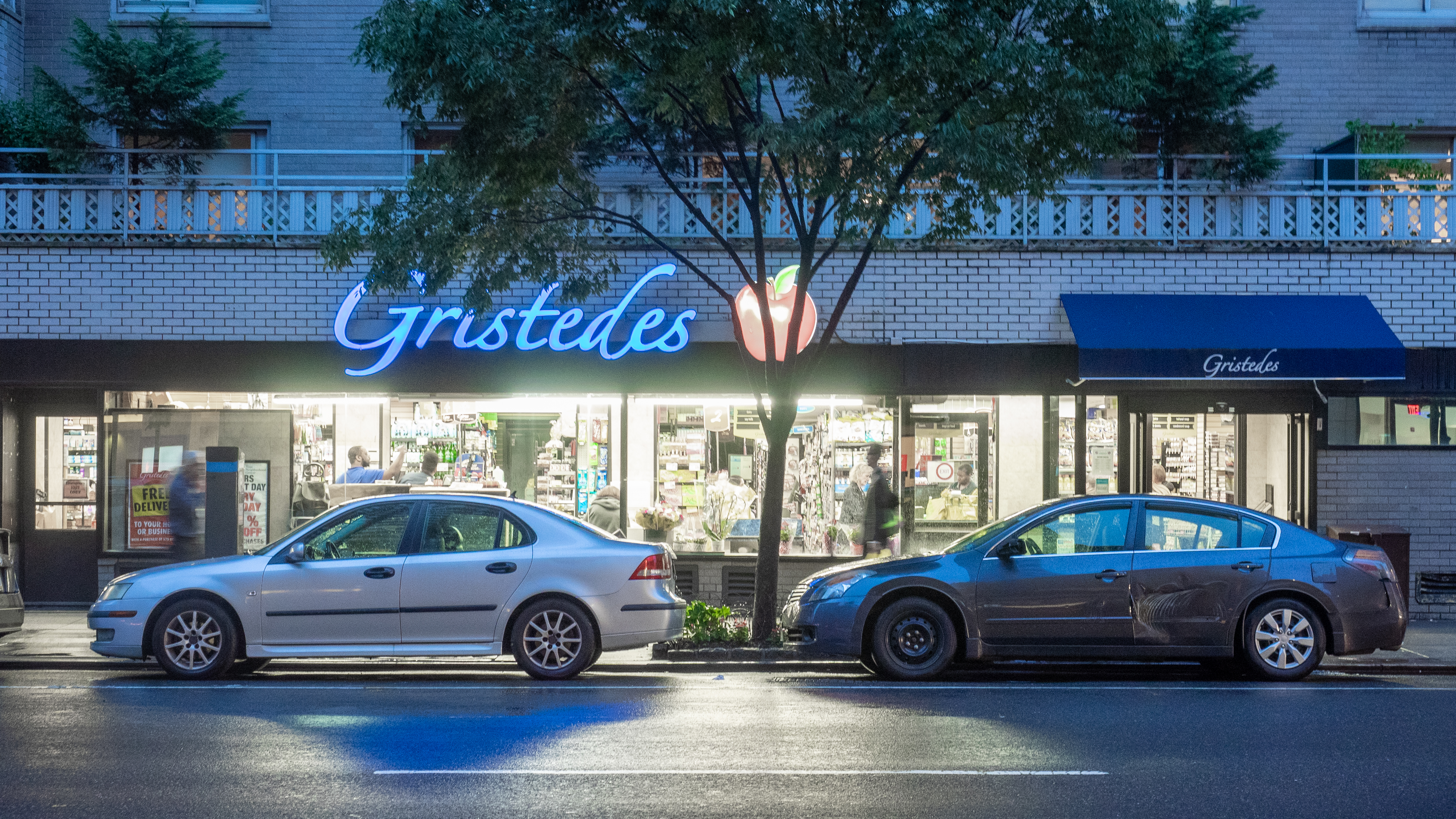 Upper East Side, NYC